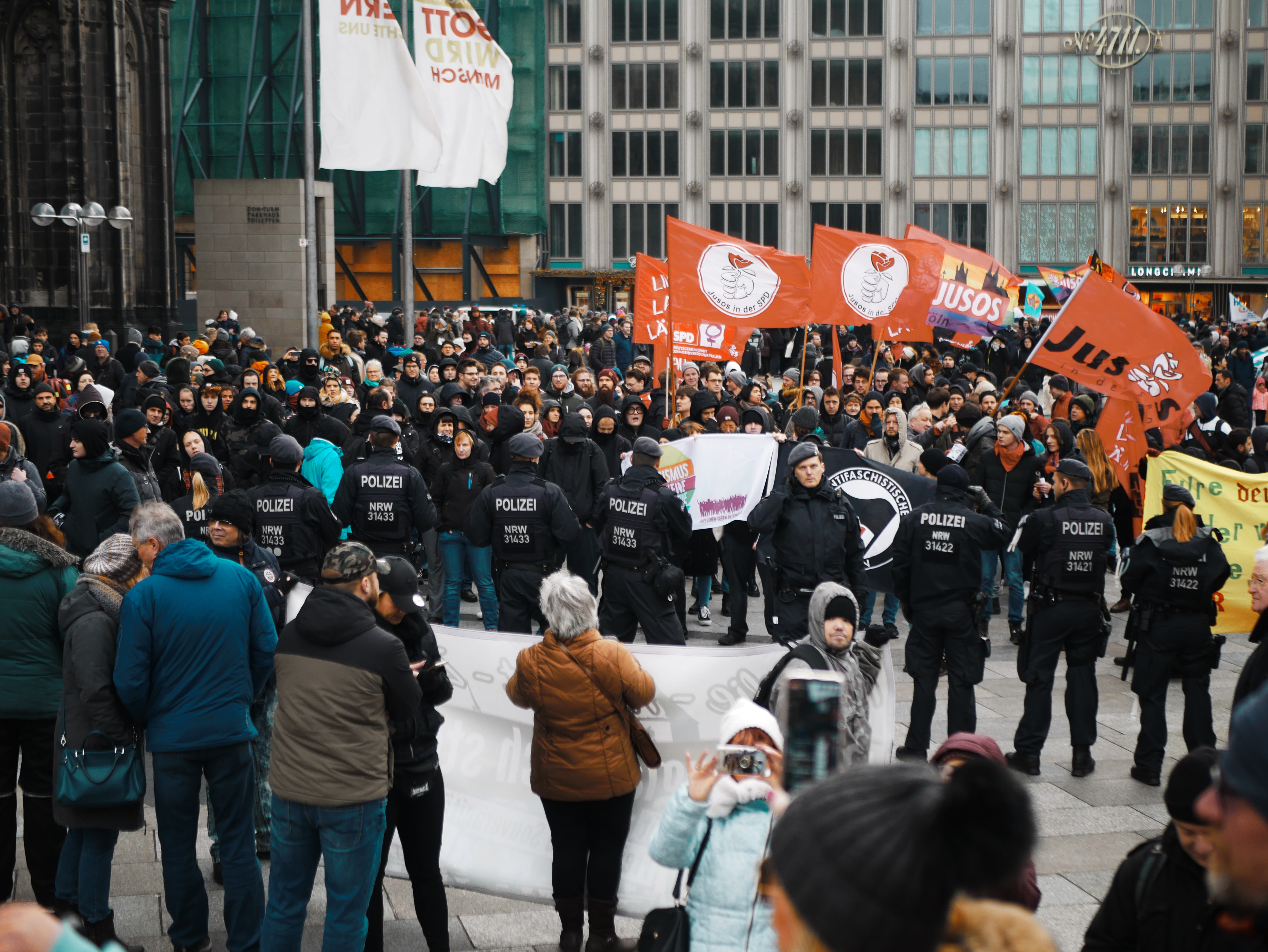 Gegendemonstration in Köln Januar 2020 gegen eine Kundgebung anlässlich des "Umweltsau"-Videos. Copyright: Vitus Studemund